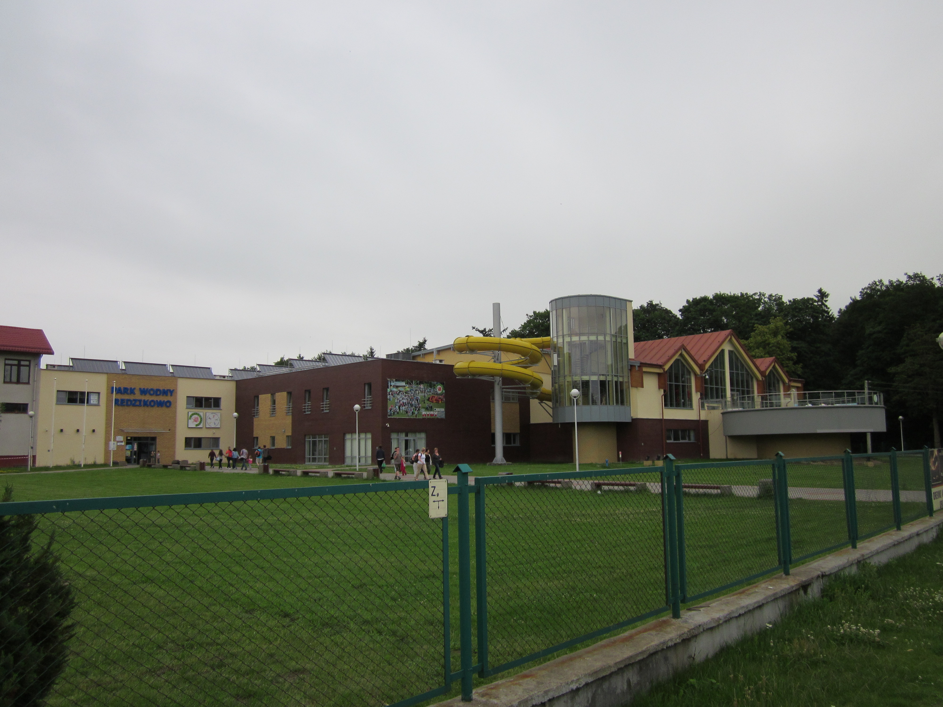 Łatwo można dostać się do parku wodnego ze Słupska (ok. 6 km).